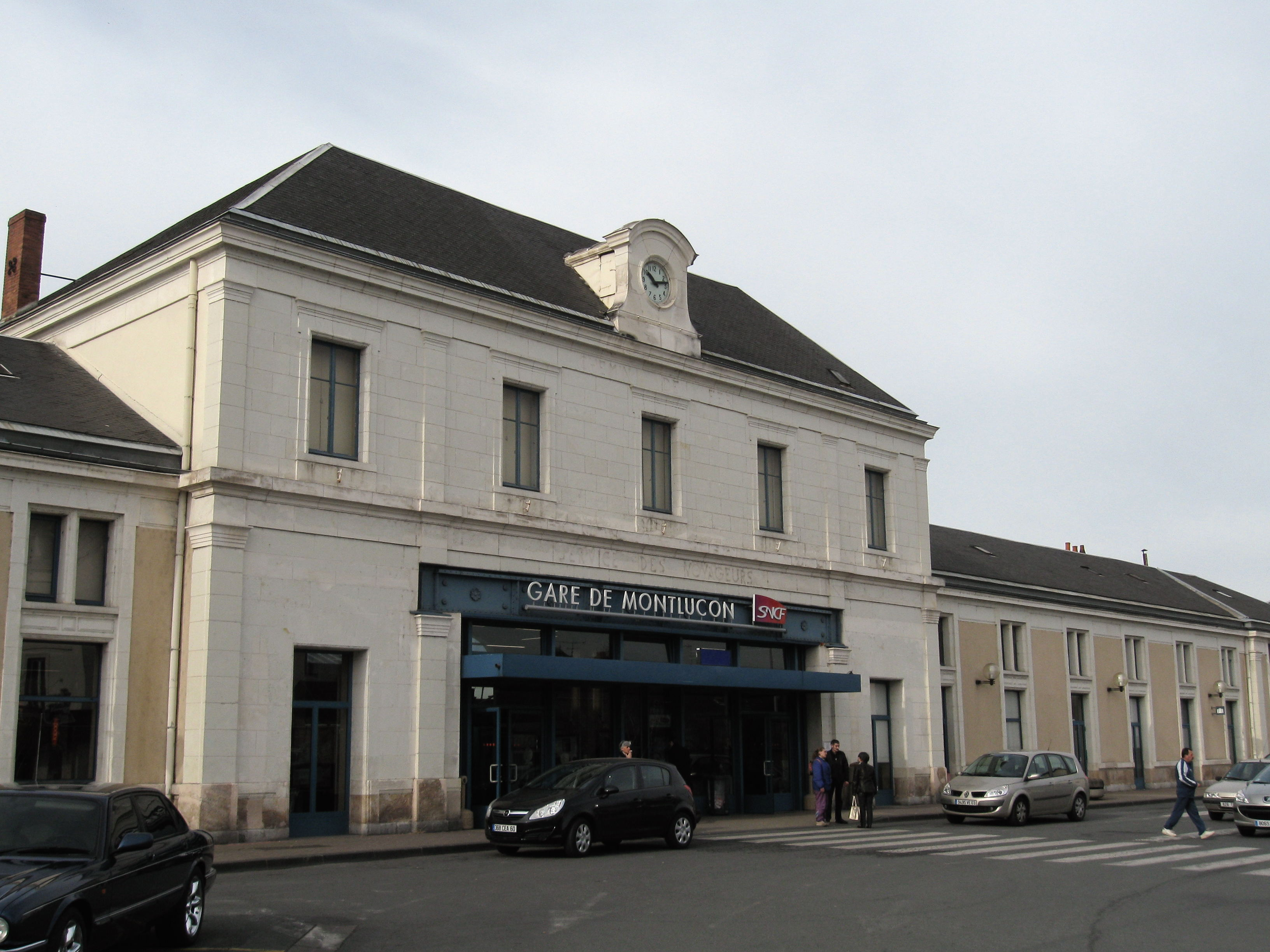 Gare de Montluçon-Ville, Montluçon, Allier, France